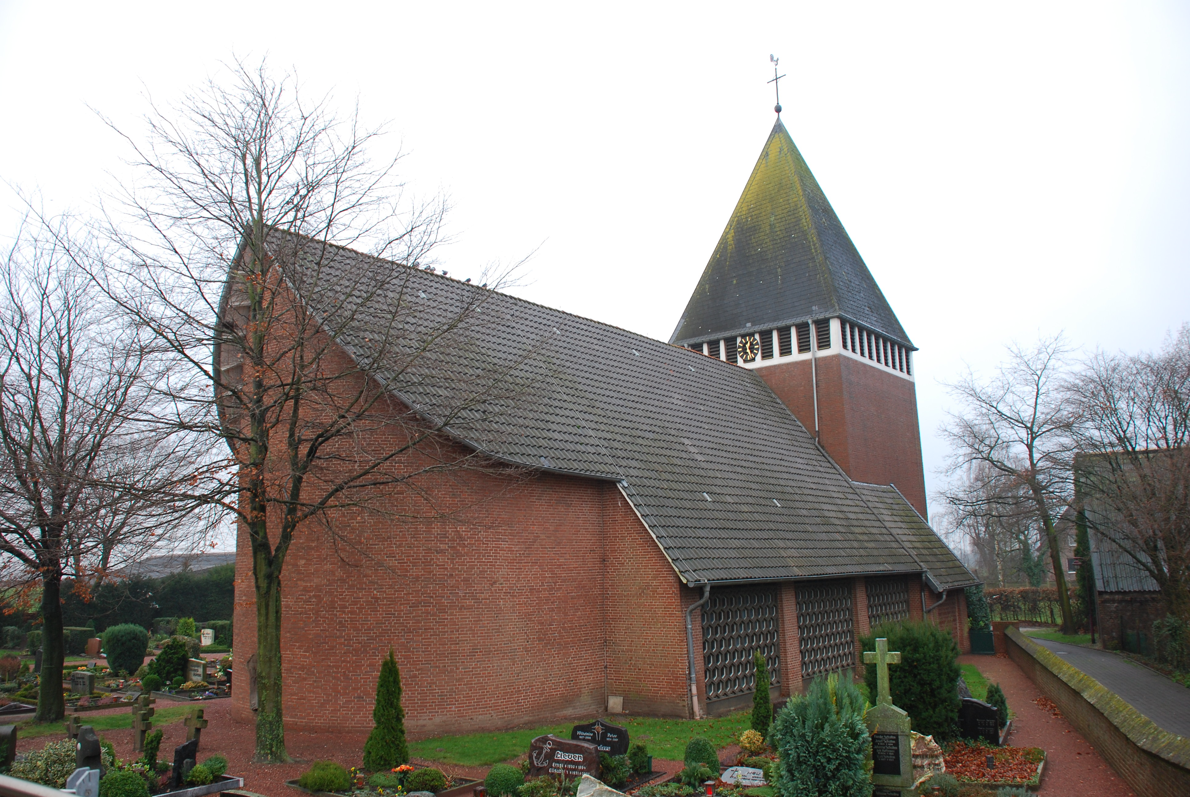 Kirche St. Petrus in Obermörmter